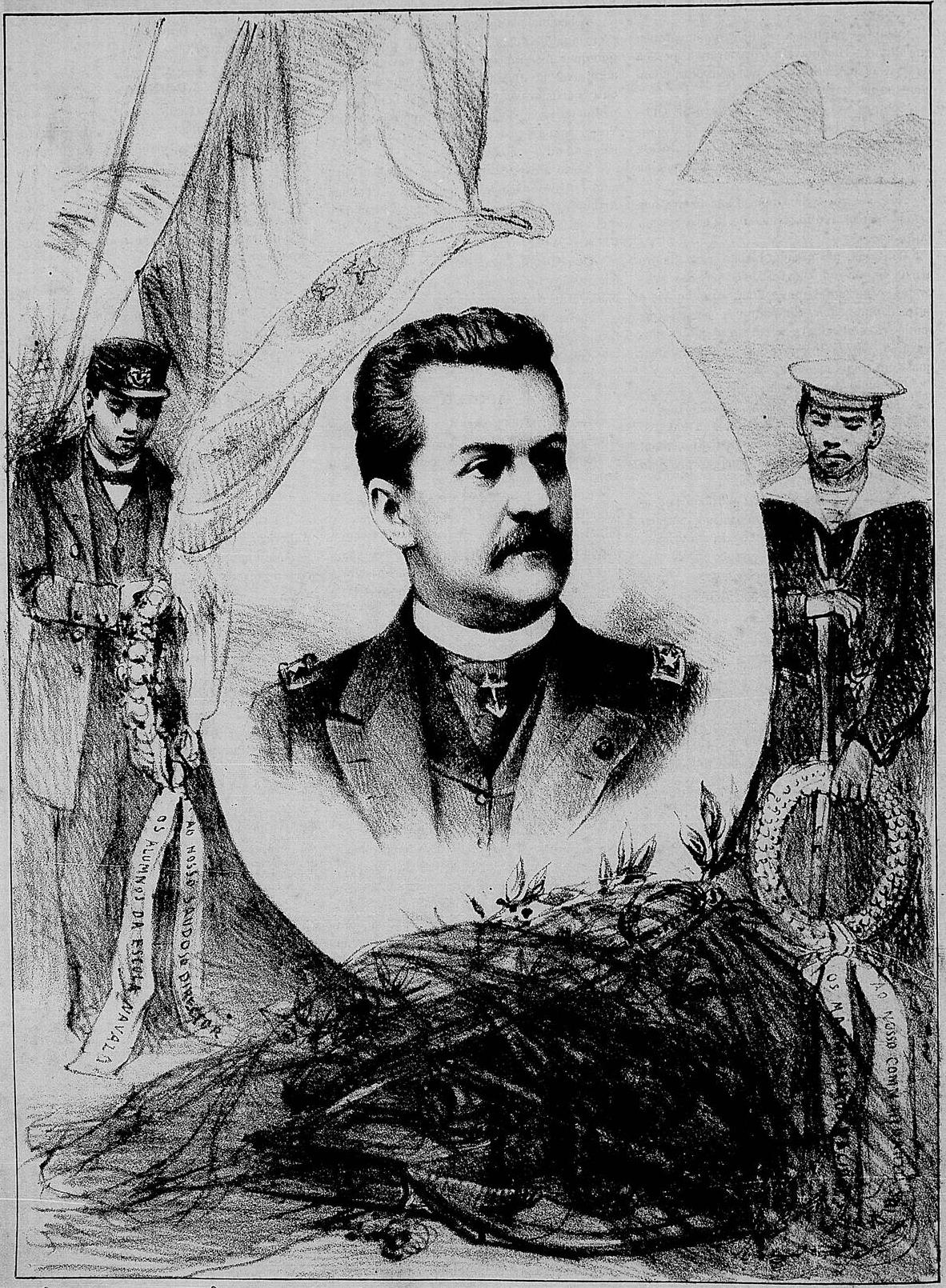 O almirante Luís Filipe de Saldanha da Gama, morto em combate contra as forças castilhistas no dia 24 de junho de 1895.